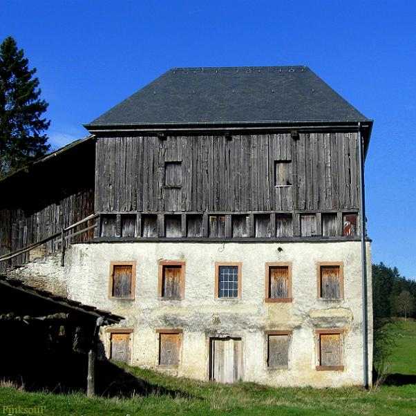 Voormalige leerlooierij Pintsch